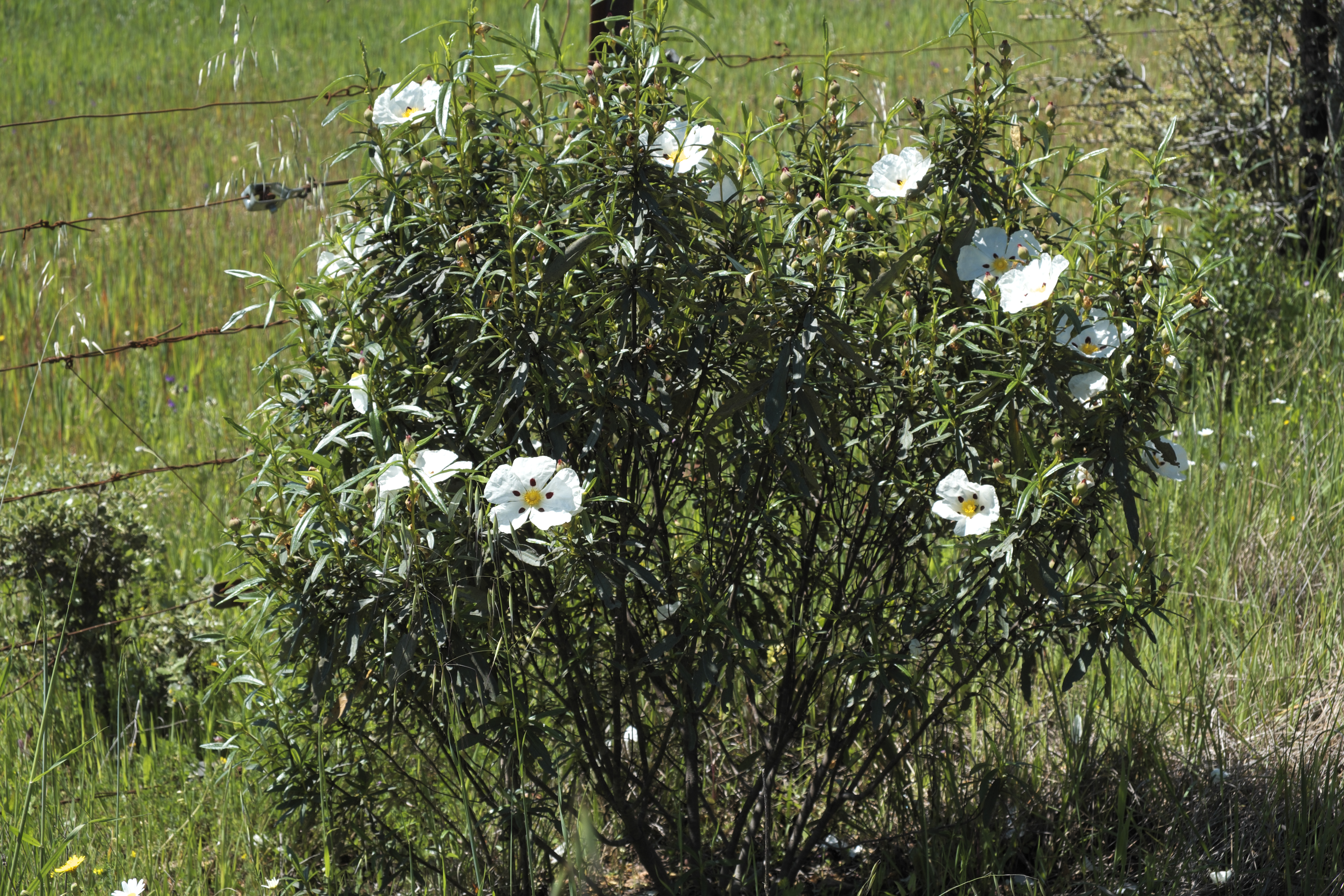 Landschaft bei Castilblanco in der Comarca La Siberia in der Provinz Badajoz (Extremadura/Spanien)